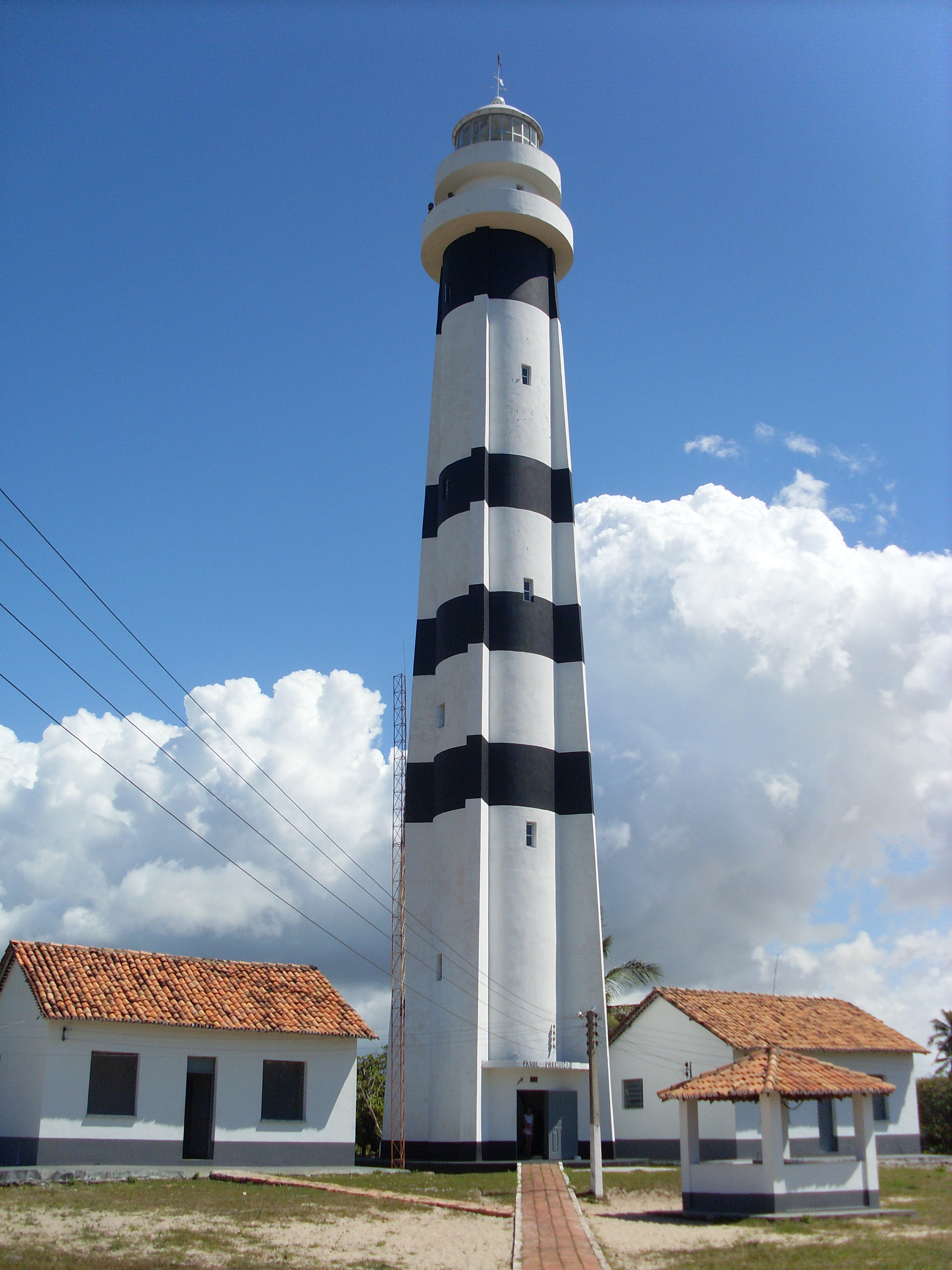 Farol Preguiças localizado no Povoado Mandacaru, distrito de Barreirinhas/MA.